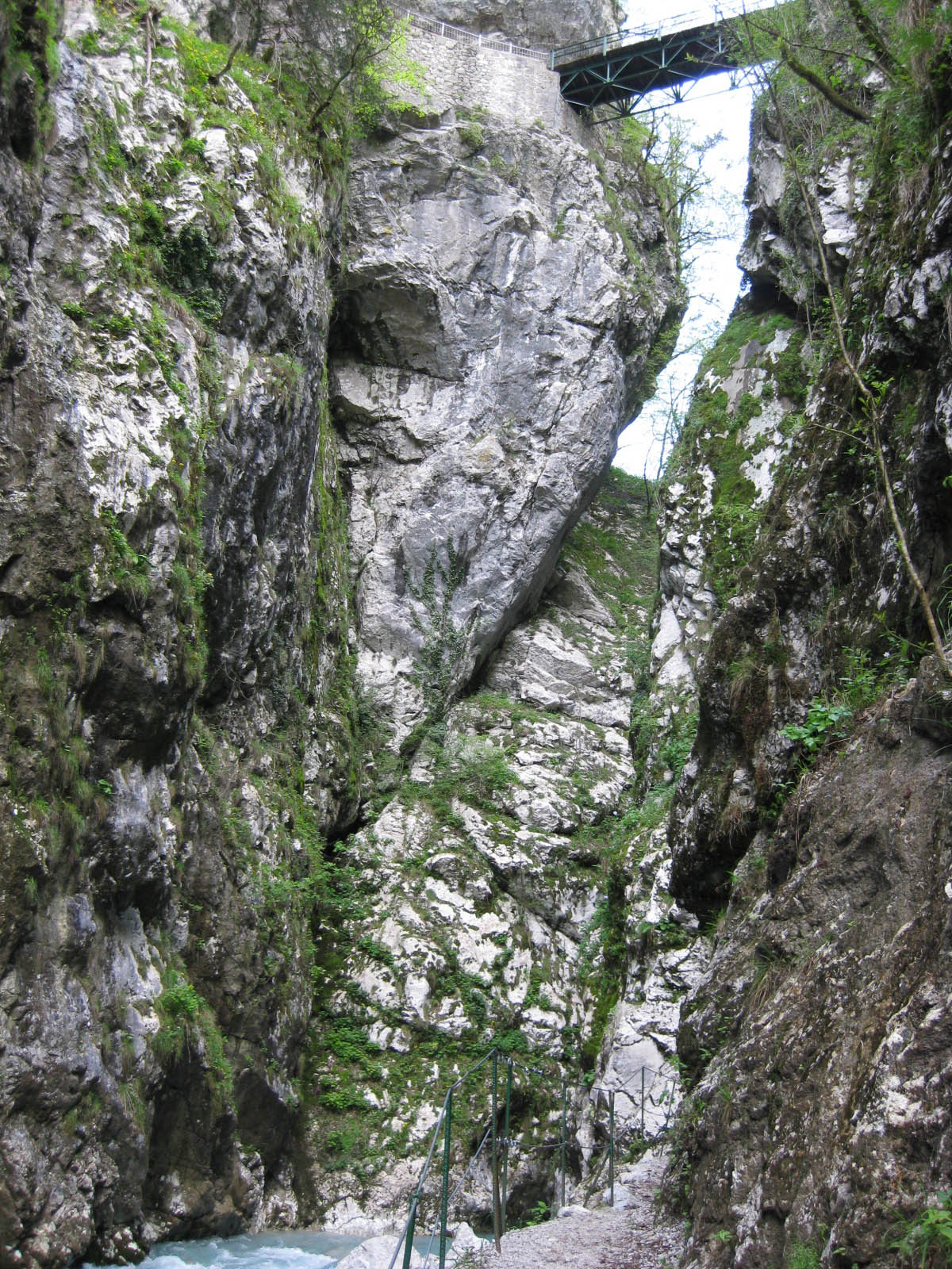 Korita Tolminke/Devil's bridge, Triglav national Park, Slovenia